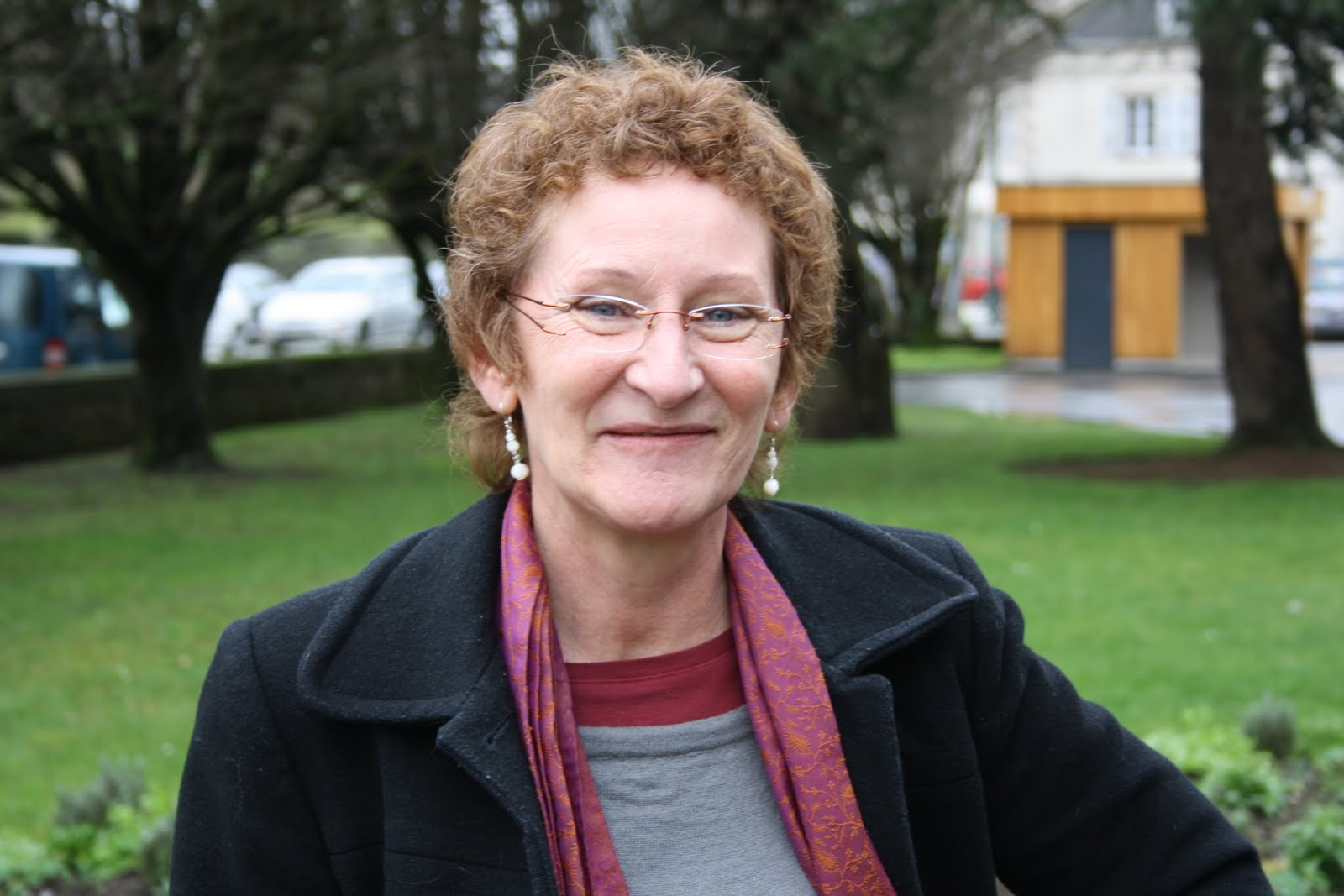 La maire de Plescop Nelly Fruchard le 19 février 2011 à Pontivy lors de son élection comme présidente de l'AEPB.